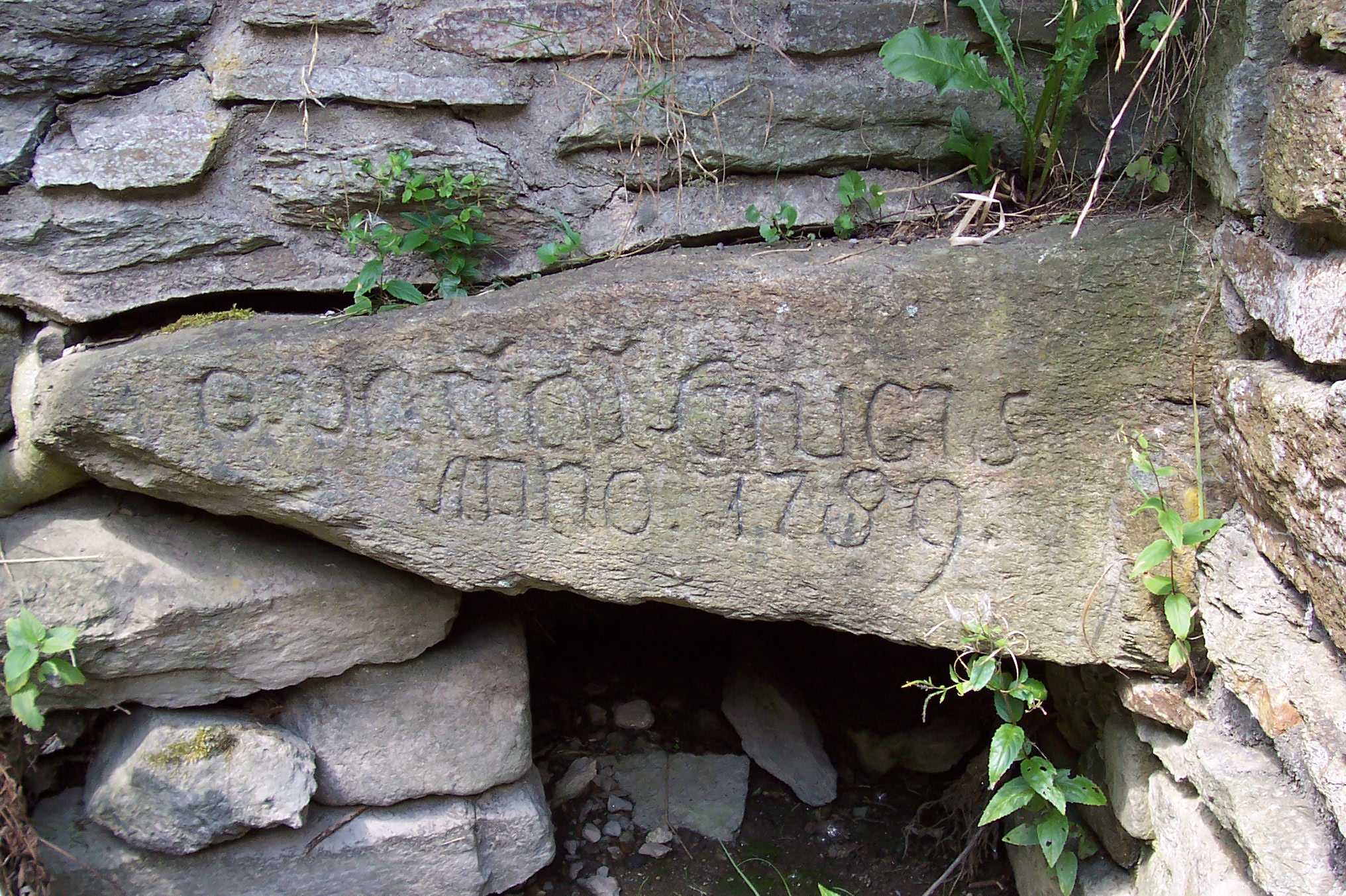 Mundloch des "Bierschnabel Stolln" in Frohnau/Erzgebirge/Sachsen/Deutschland